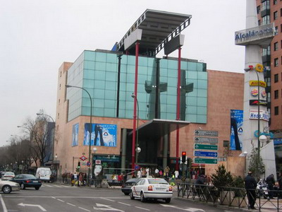 Fachada del Centro Comercial Alcalá Norte